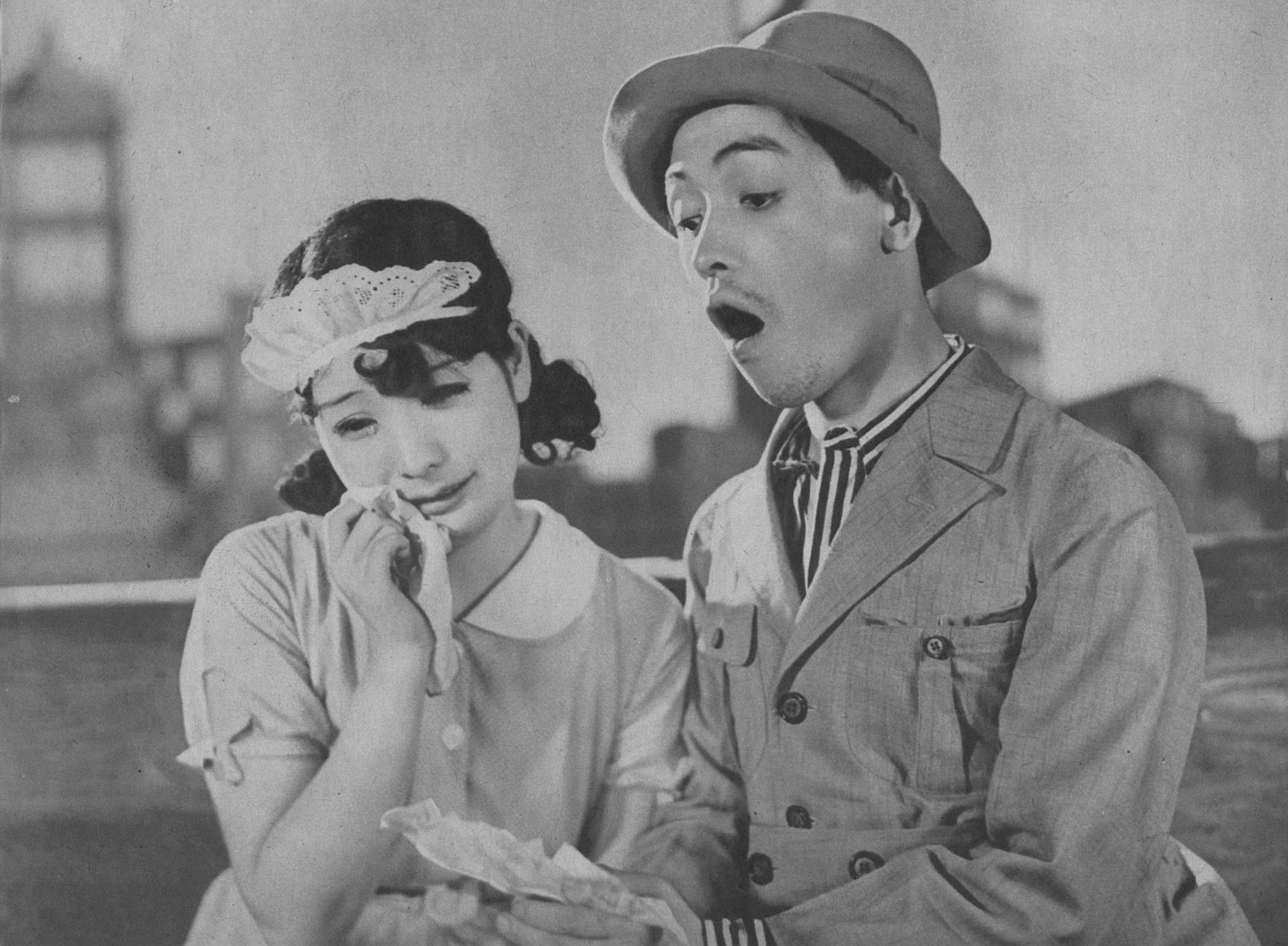 Sachiko Chiba (千葉早智子) and Kamatari Fujiwara (藤原釜足) in a still photo of the film Ongaku kigeki horoyoi jinsei (『音楽喜劇 ほろよひ人生』, 1933)